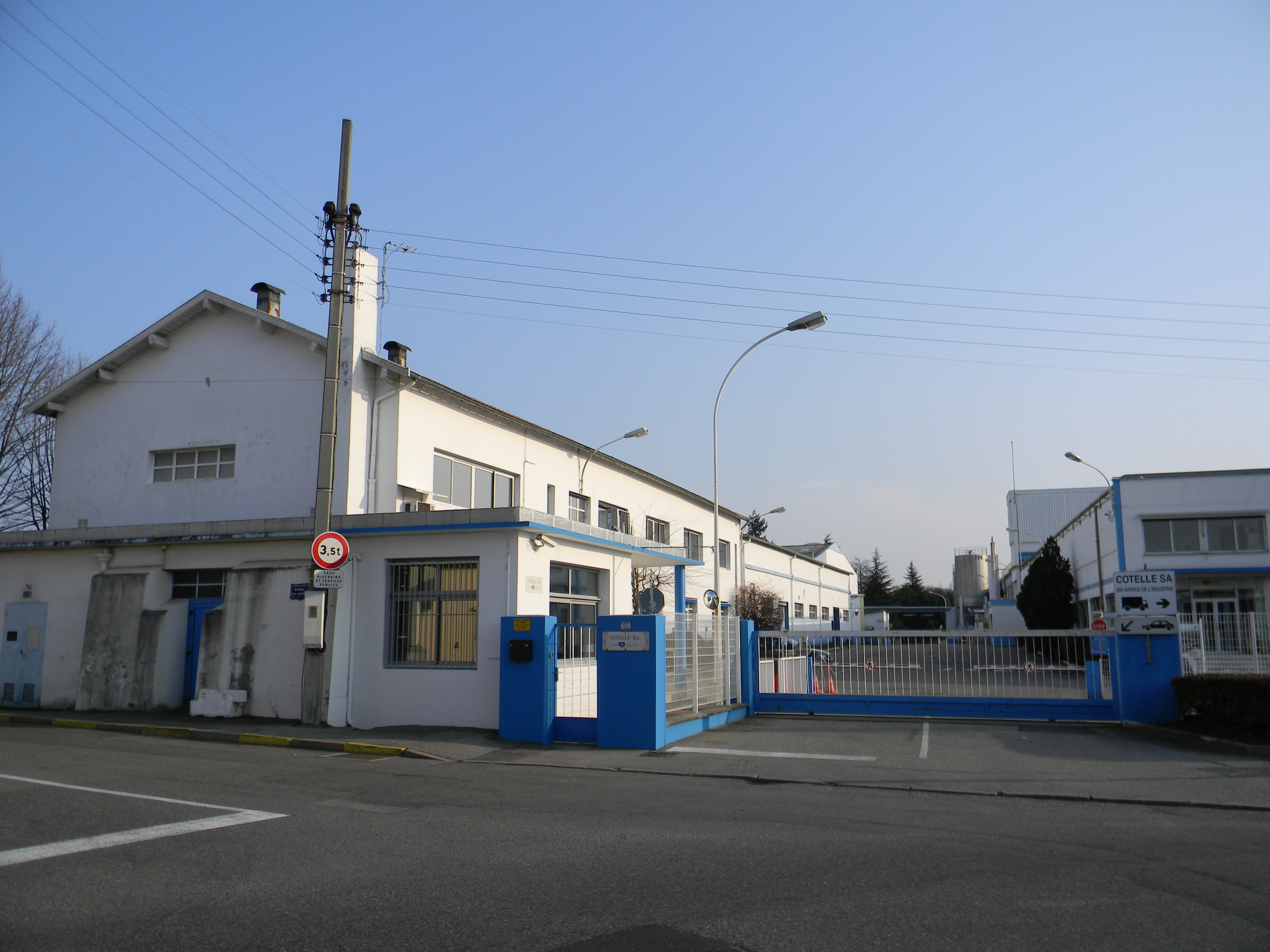 L'entreprise Cotelle à Rillieux-la-Pape, appartenant au groupe Colgate-Palmolive, fabriquait autrefois de l'eau de javel.